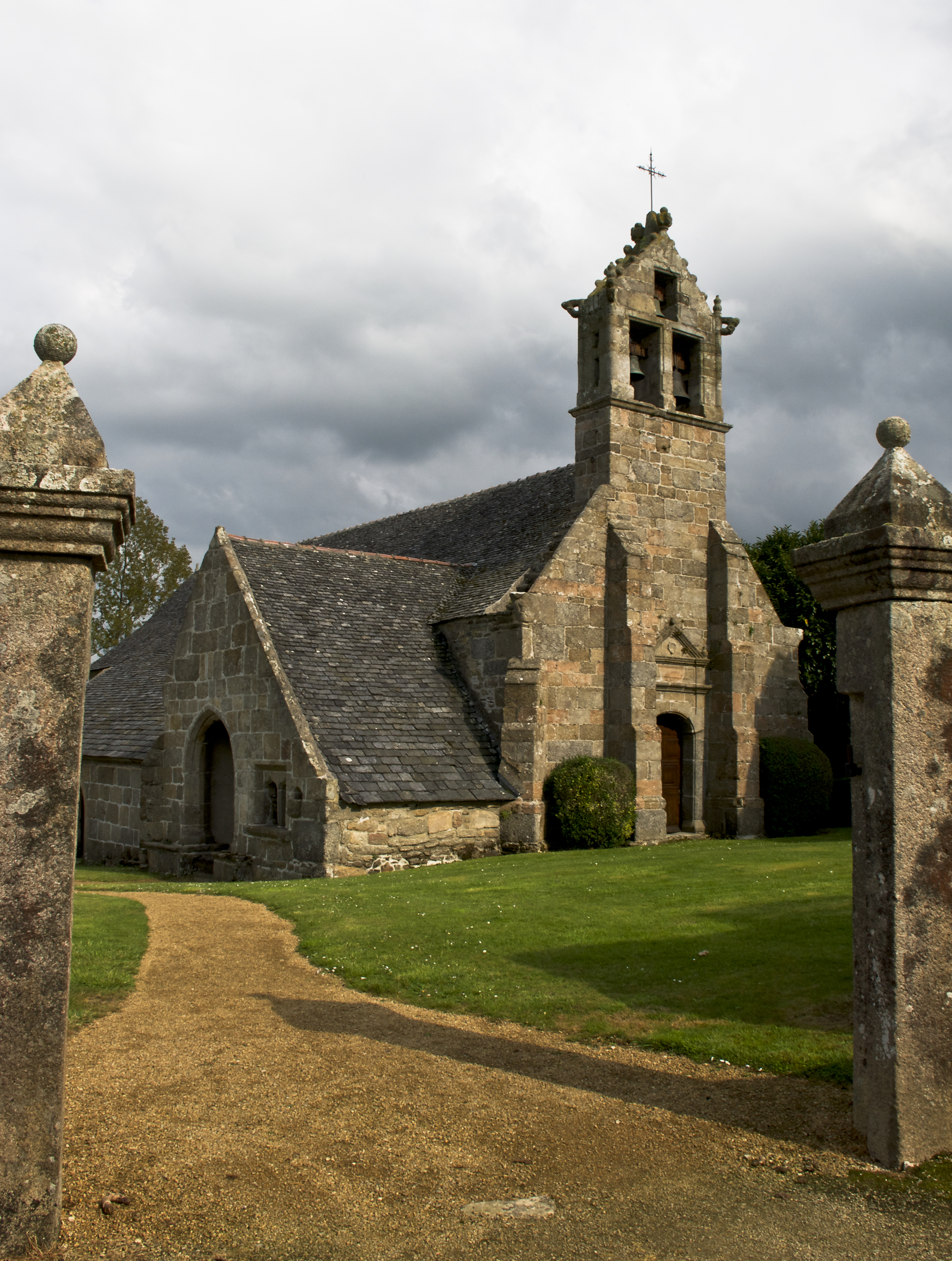 L'Église de Guénézan est un lieu de culte catholique situé sur la commune de Bégard, dans le département français des Côtes d'Armor.